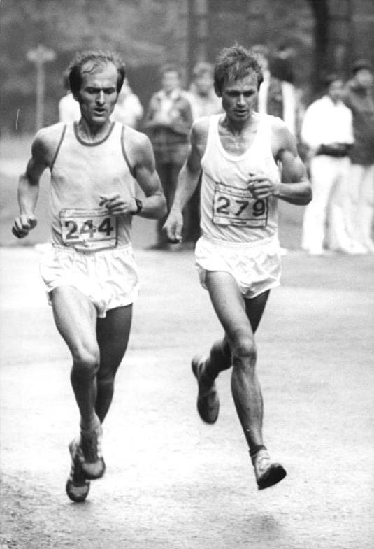 ADN-ZB Häßler 30.6.82 Dresden: DDR-Leichtatheltikmeisterschaften-Marathonlauf. Waldemar Cierpinski (Nr. 244) entschied bei den Leichtathletik-DDR-Meisterschaften in Dresden den Marathonlauf für sich. Rechts Joachim Truppel.